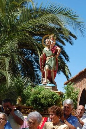 Cofradía de San Cristóbal de Castilblanco en procesión con la imagen del santo